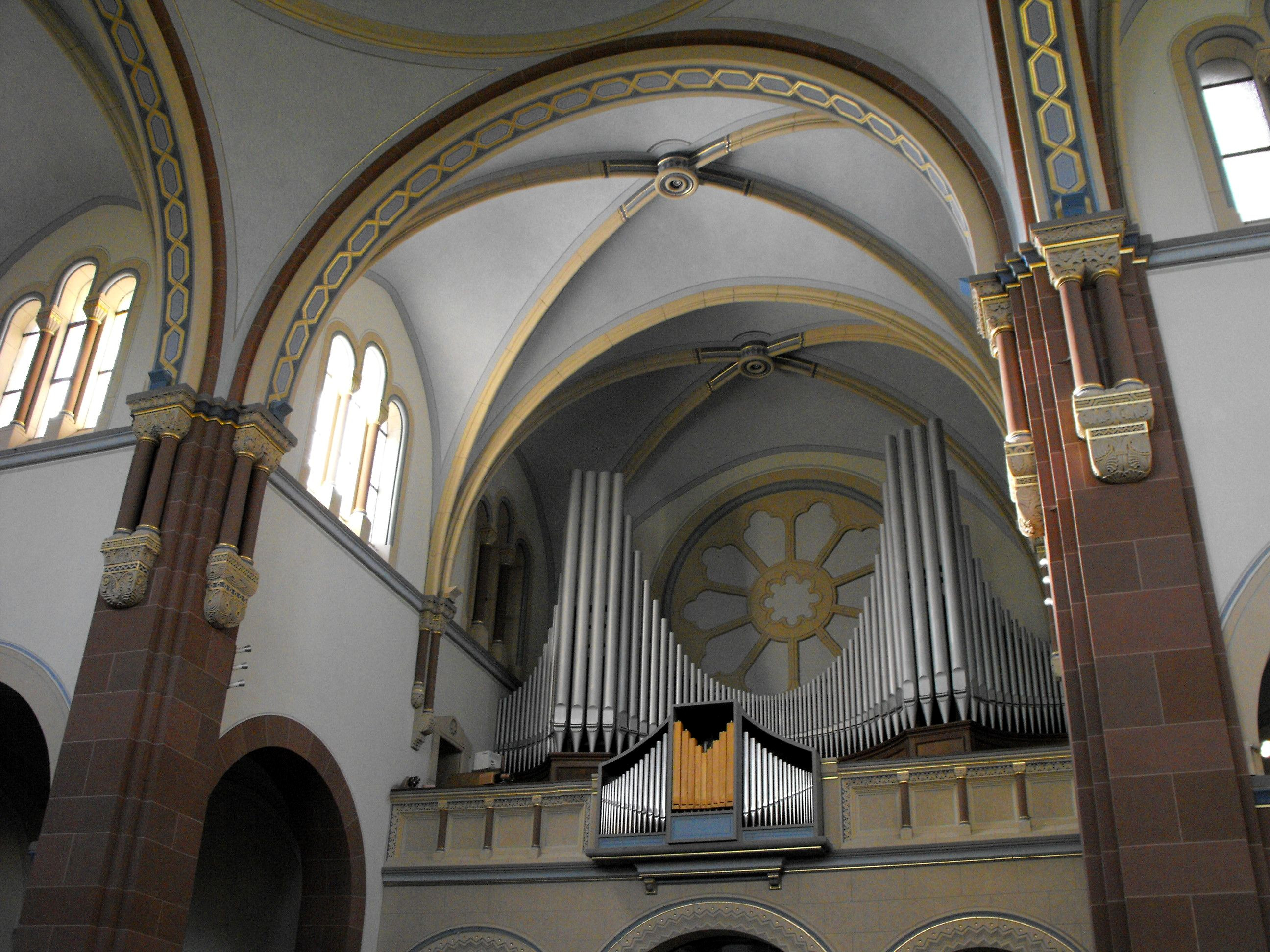 Aachen, Stadtteil Burtscheid, Querschiff der Herz-Jesu Kirche mit der Orgel